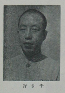 中國人民政治協商會議第一屆全體會議代表